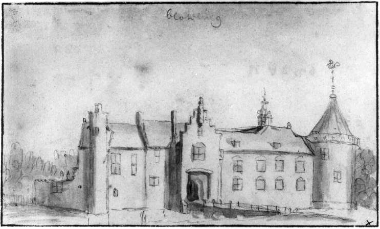 Castle Blotinge in Rijswijk, Netherlands (front view)